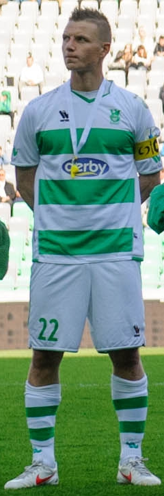 31 March 2012, Stozsice, Ljubljana, Slovenia - Olimpija during football game Olimpija - Domzale, round 27 of PrvaLiga 2011-2012.